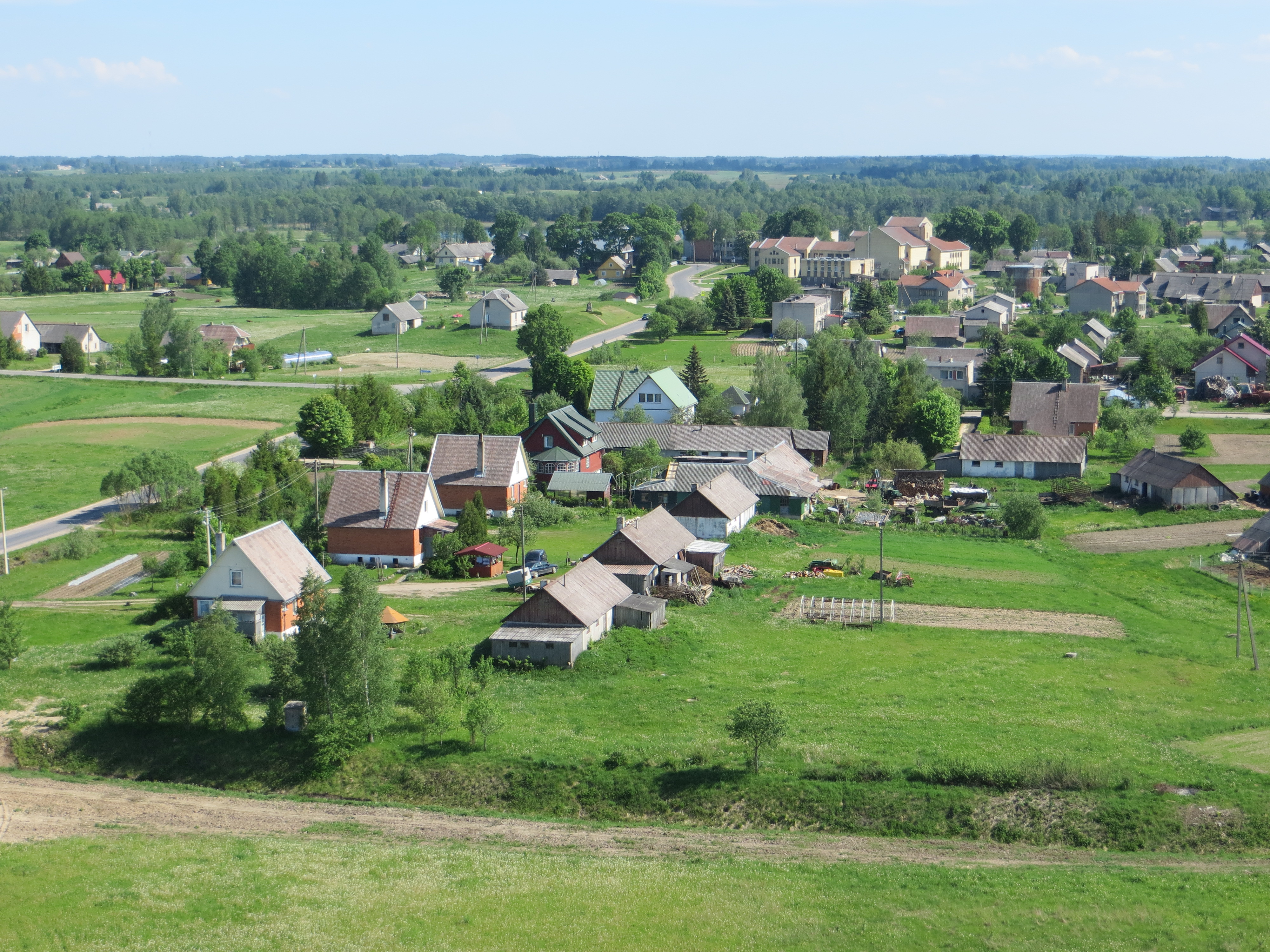 Inturkė, Lithuania